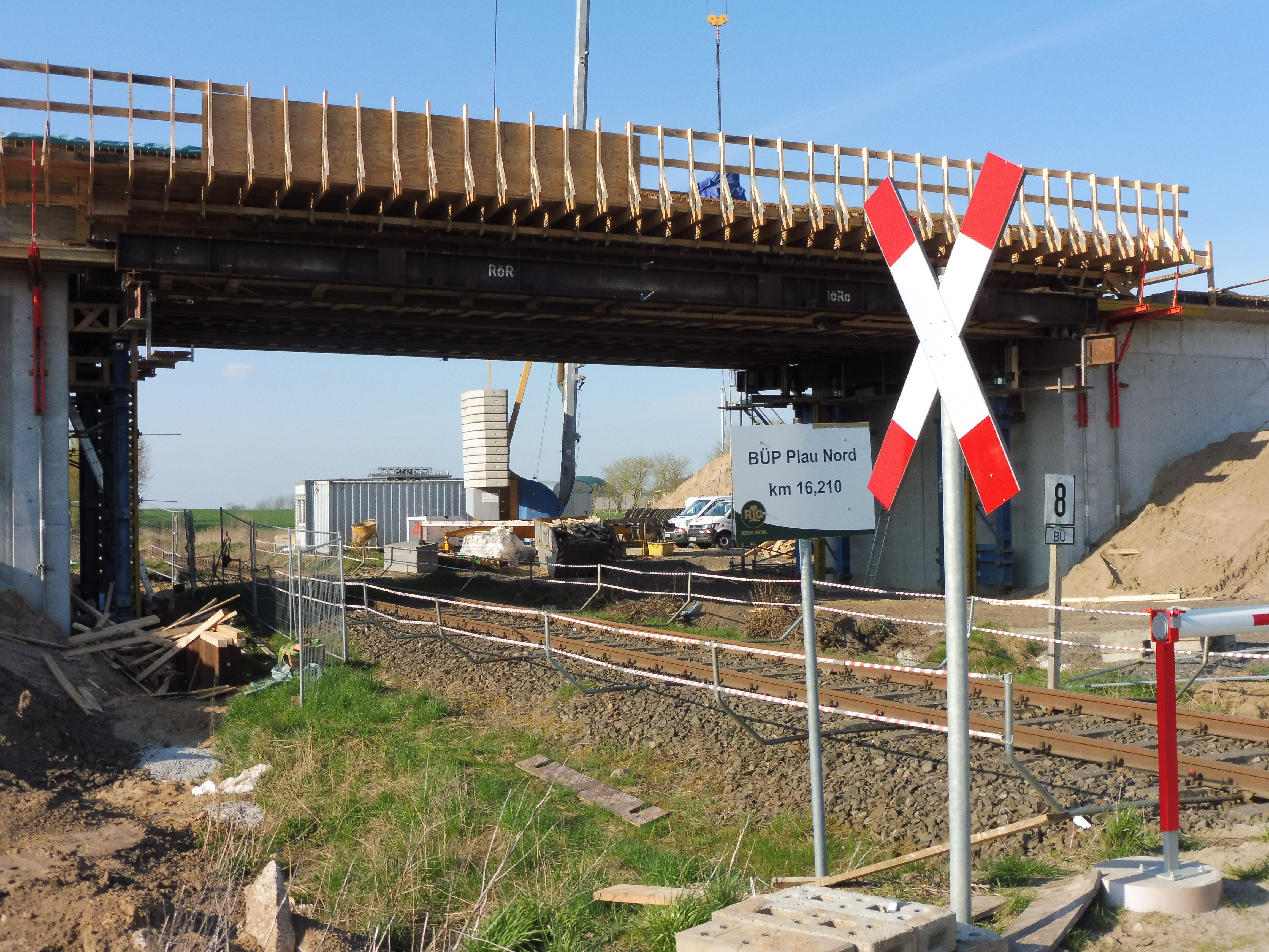 Brückenbaustelle der Umgehungsstraße Plau Nord